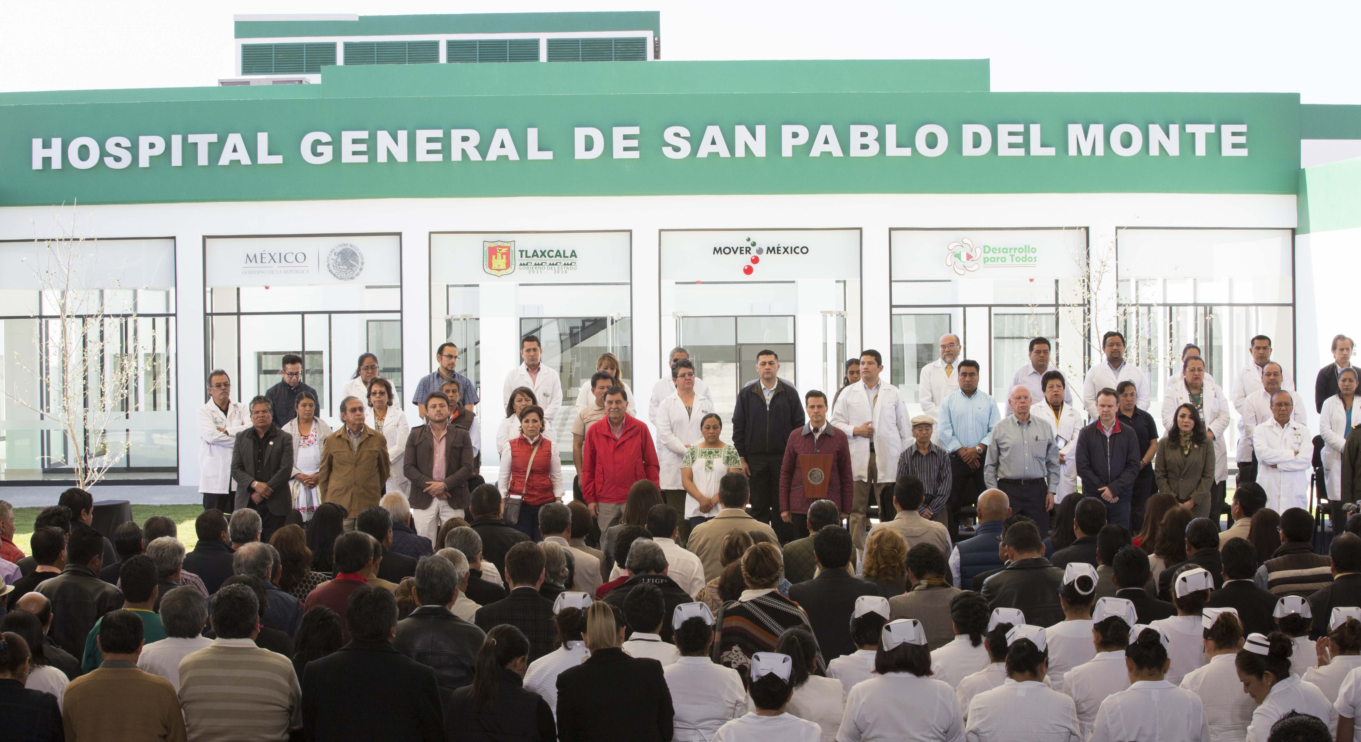 El Presidente Enrique Peña Nieto encanezó la entrega del Hospital General de San Pablo del Monte durante la cual se guardó un minuto de silencio en solaridad por todos aquellos que lamentablemente perdieron la vida en los hechos ocurridos en el municipio de Tultepec